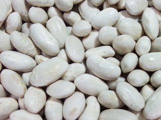 흰콩